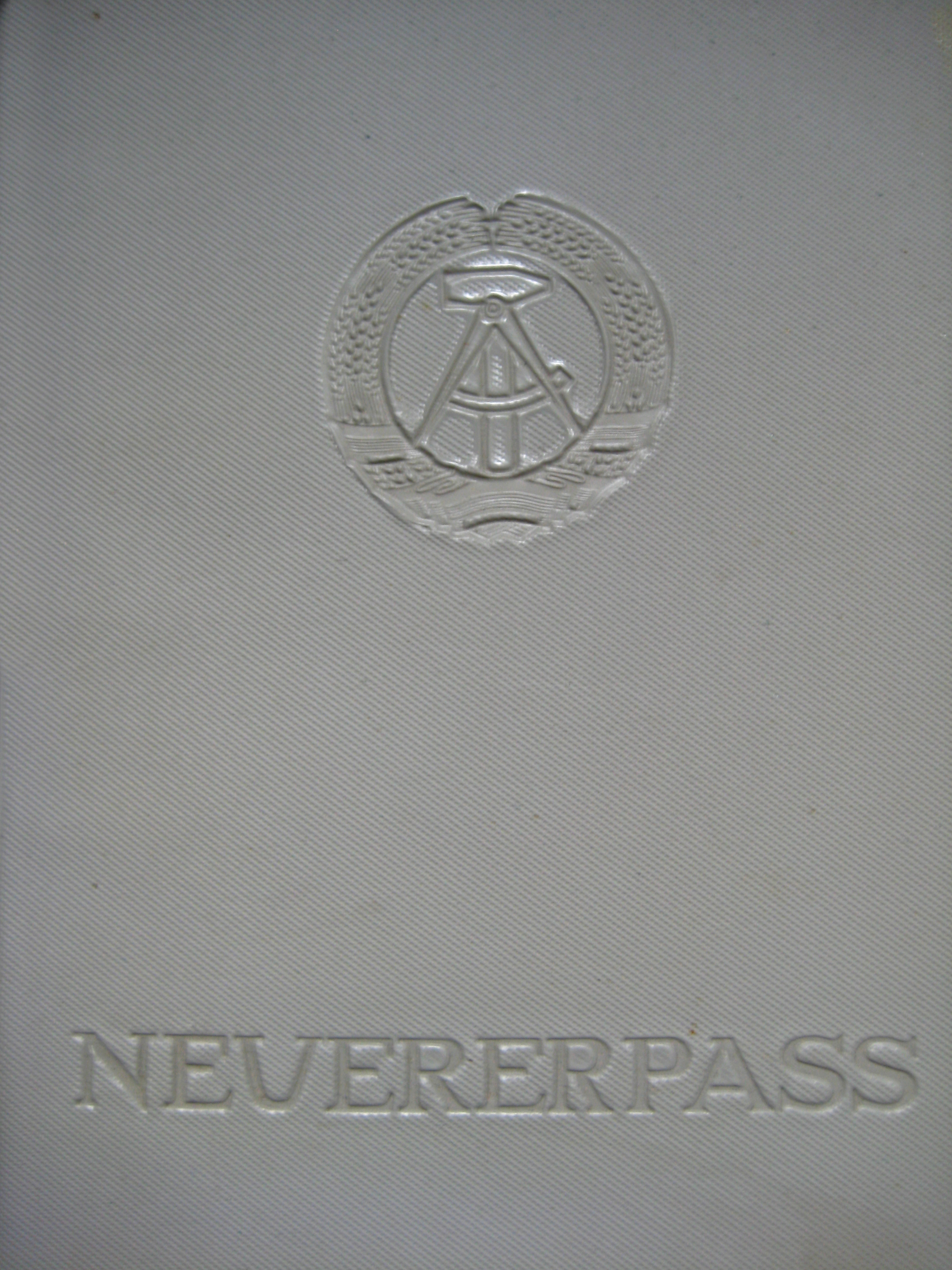 Neuererpass der DDR